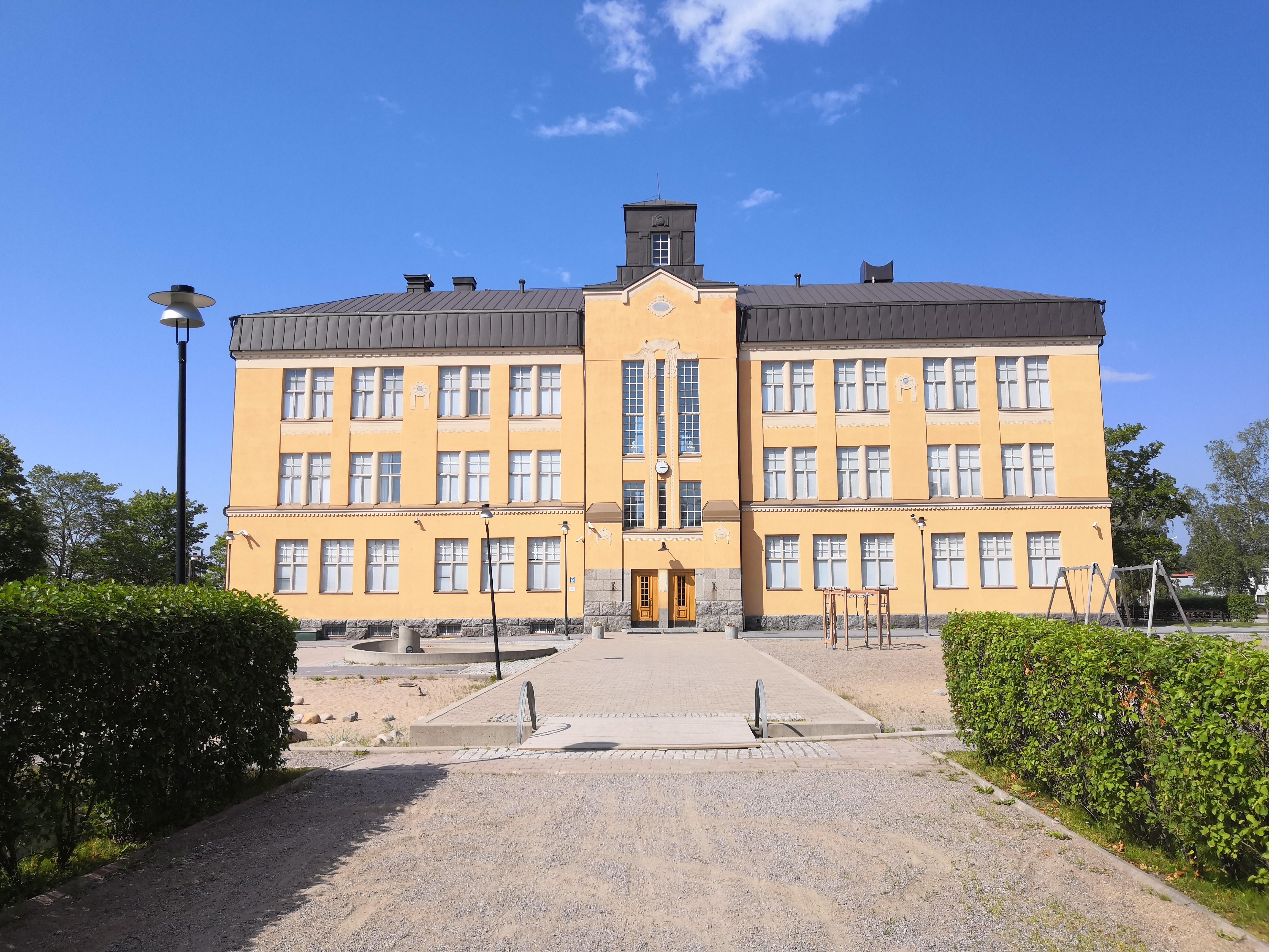 Ruotsin kielinen alakoulu